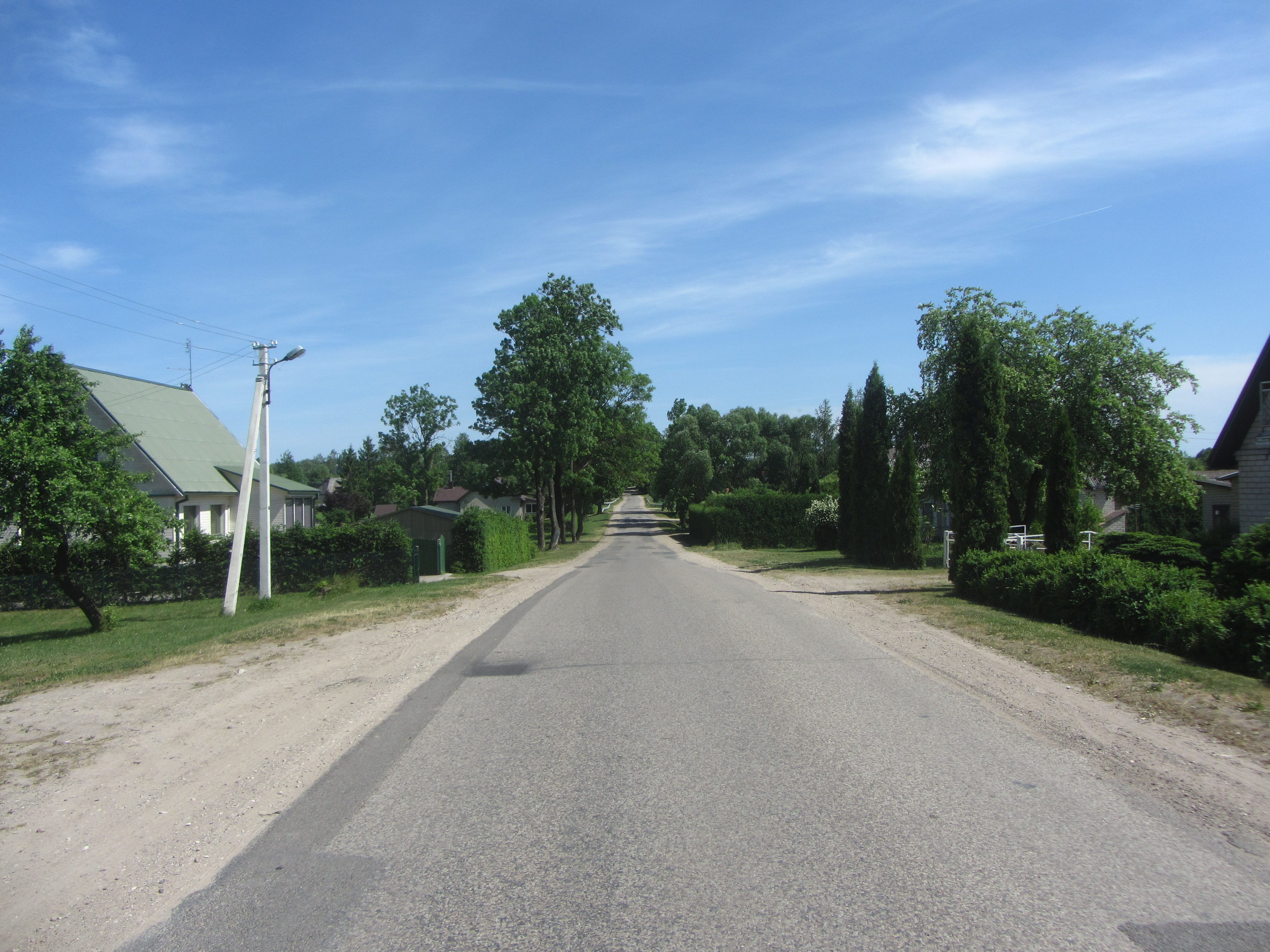 Punia, Lithuania